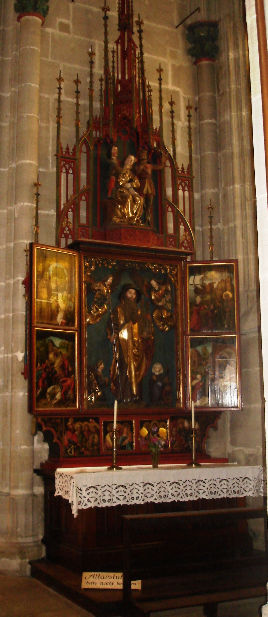 Sebaldusaltar im münster Schwäbisch Gmünd mit Tafeln aus der Werkstatt albrecht Düreres